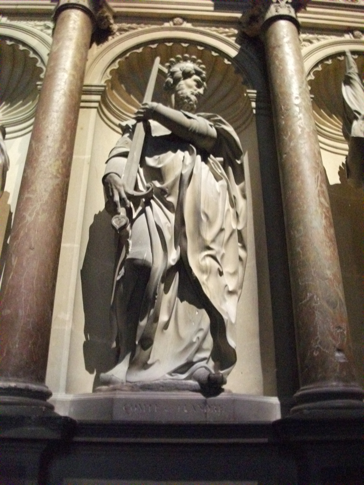 Comte de Flandres, pair primitif présent sur le tombeau de saint Remi.